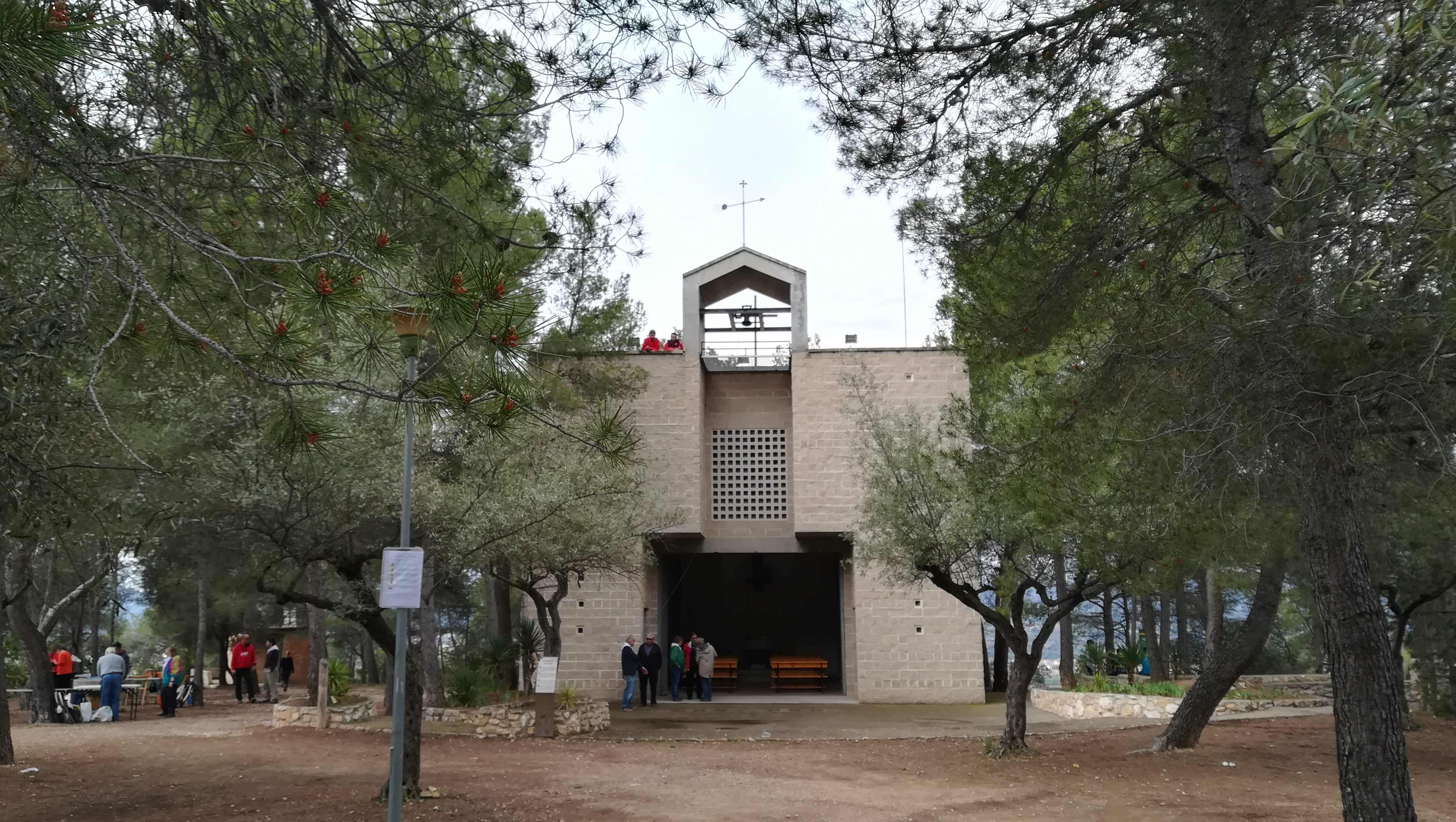 Foto on surt l'edifici de l'ermita de Sant Pau.